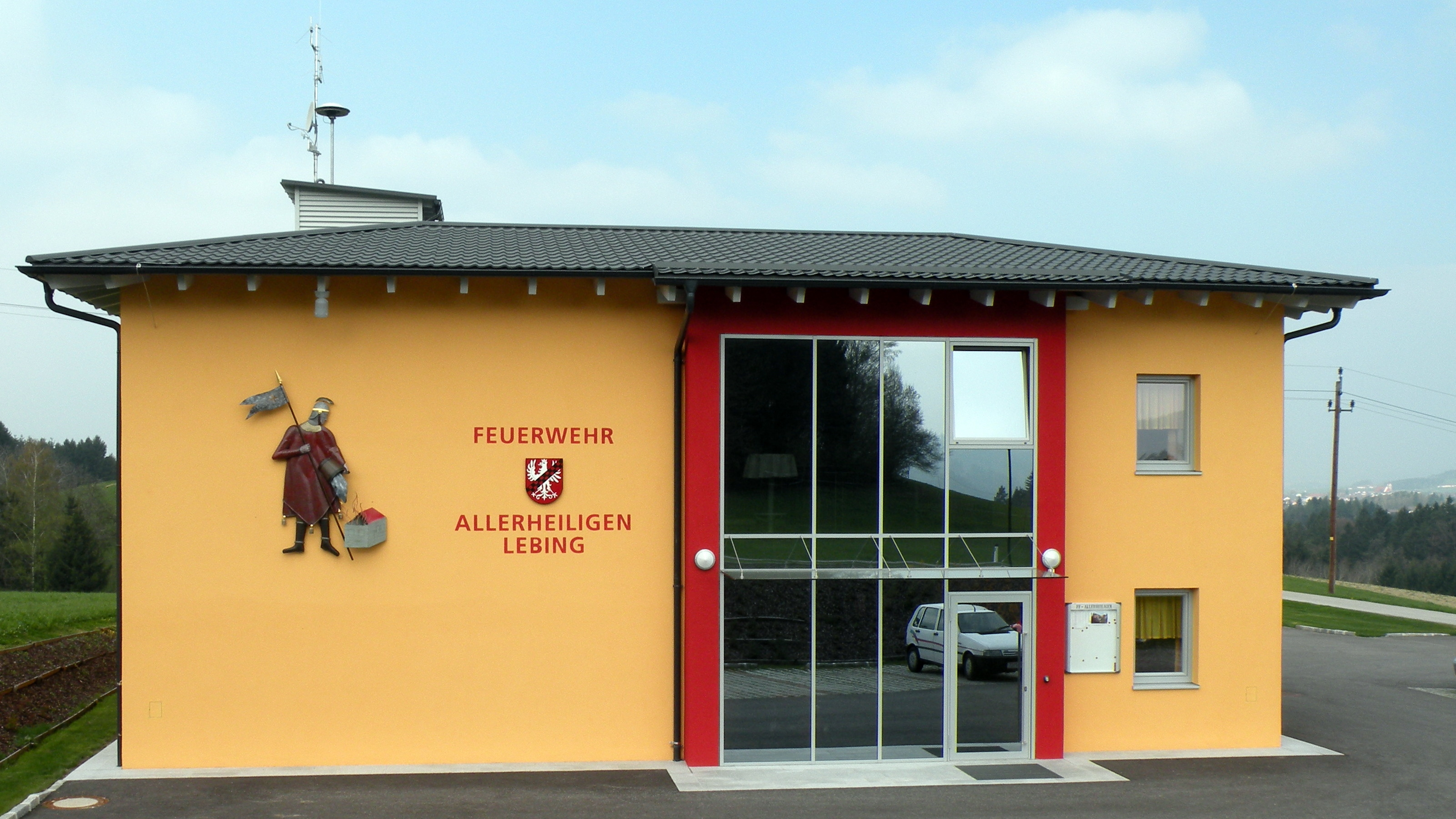 Feuerwehrzeughaus Allerheiligen im Mühlviertel.